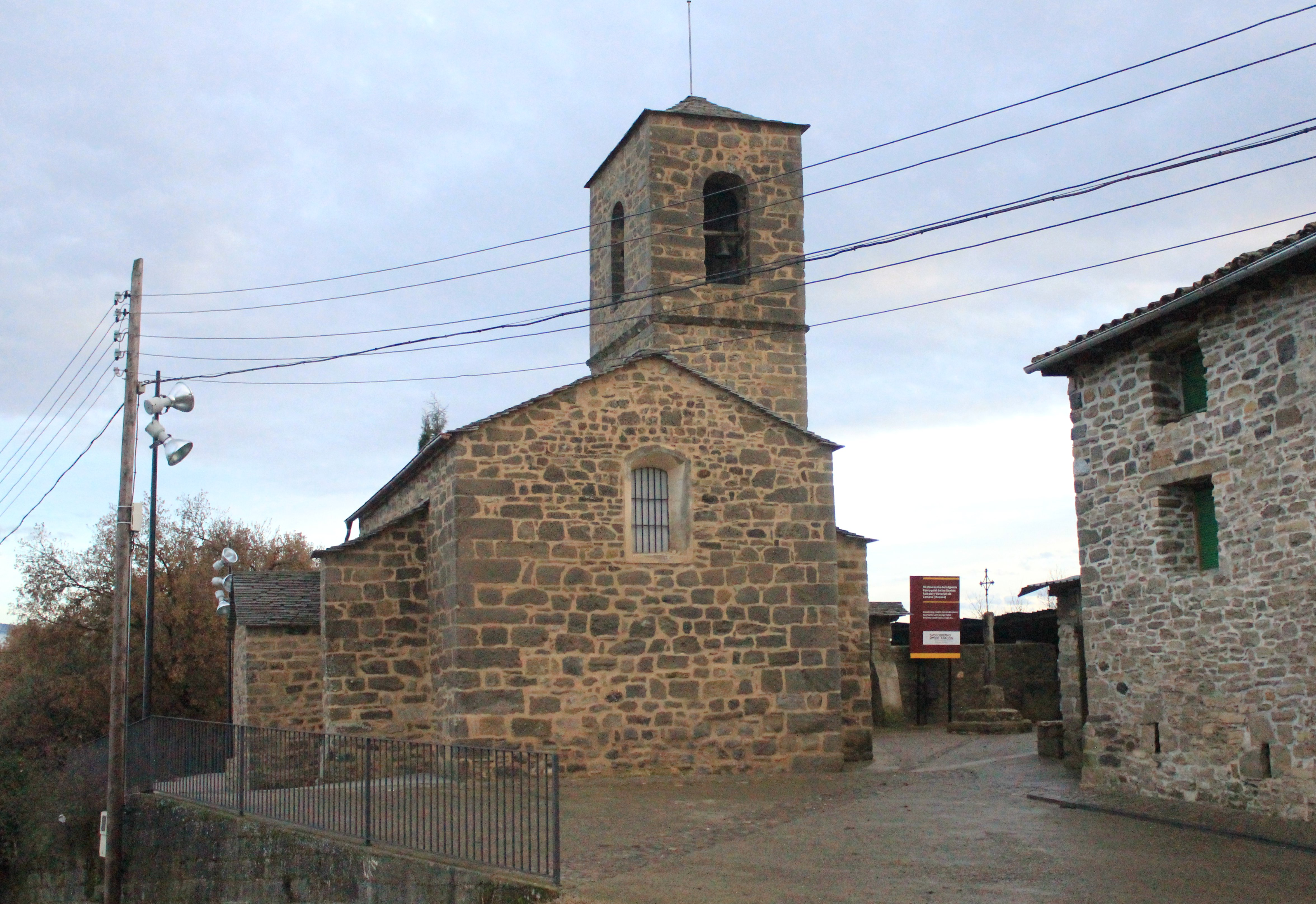 Aragonés: Lamata